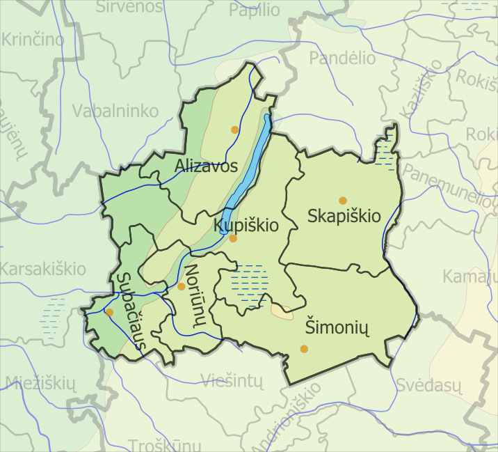 Padaryta iš :image:LietuvosSeniunijos.png